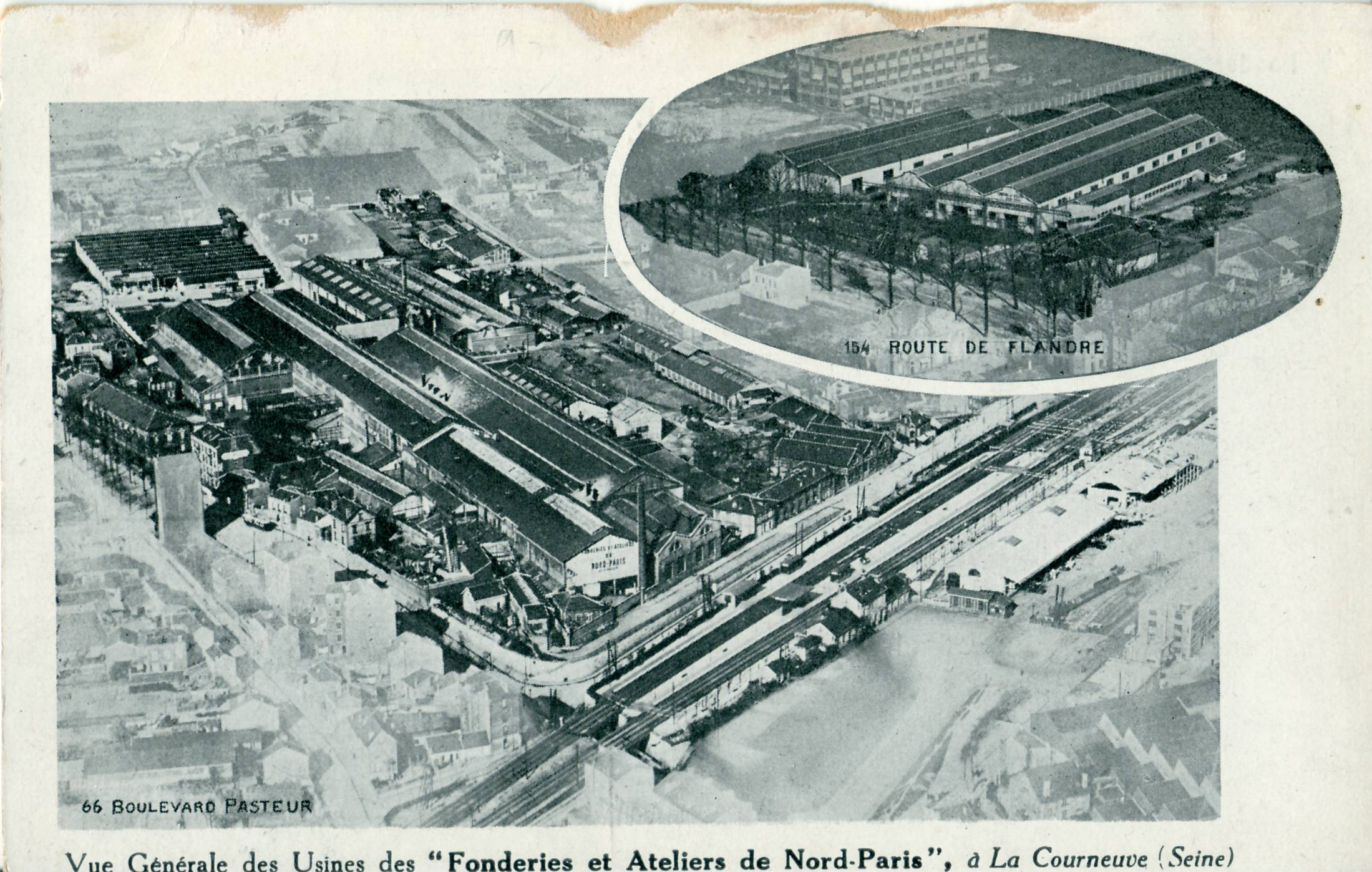 Carte de commerce ancienne Vué générale des "Fonderies et ateliers de Nord-Paris" à La Courneuve